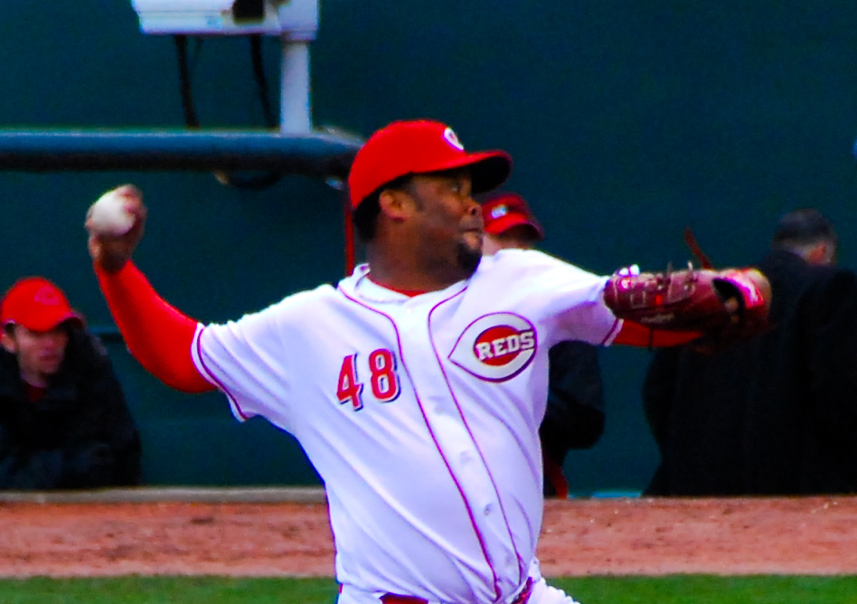 Francisco Cordero